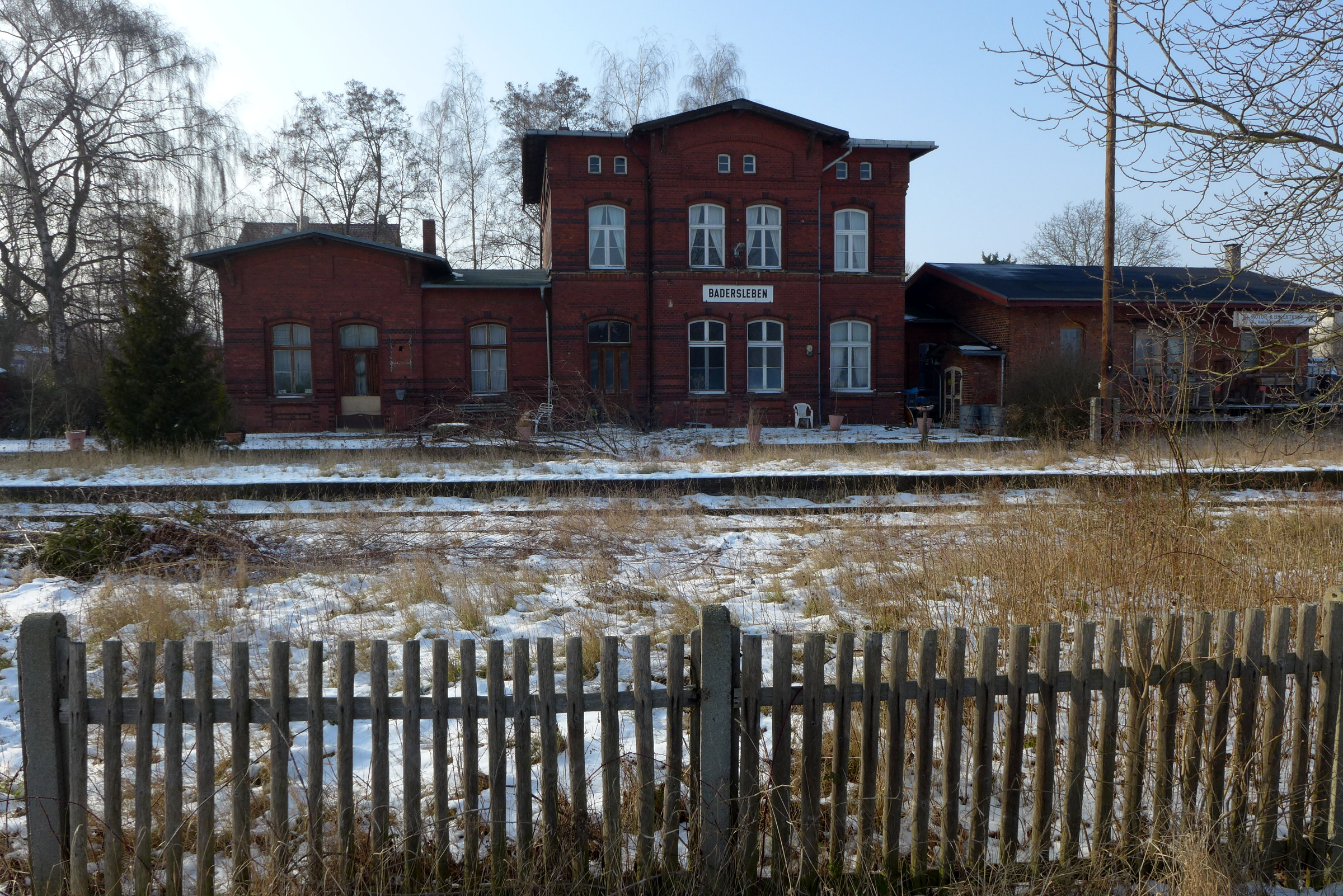 Bahnhof Badersleben an der seit Anfang der 1990er Jahre stillgelegten Bahnstrecke Nienhagen-Dedeleben